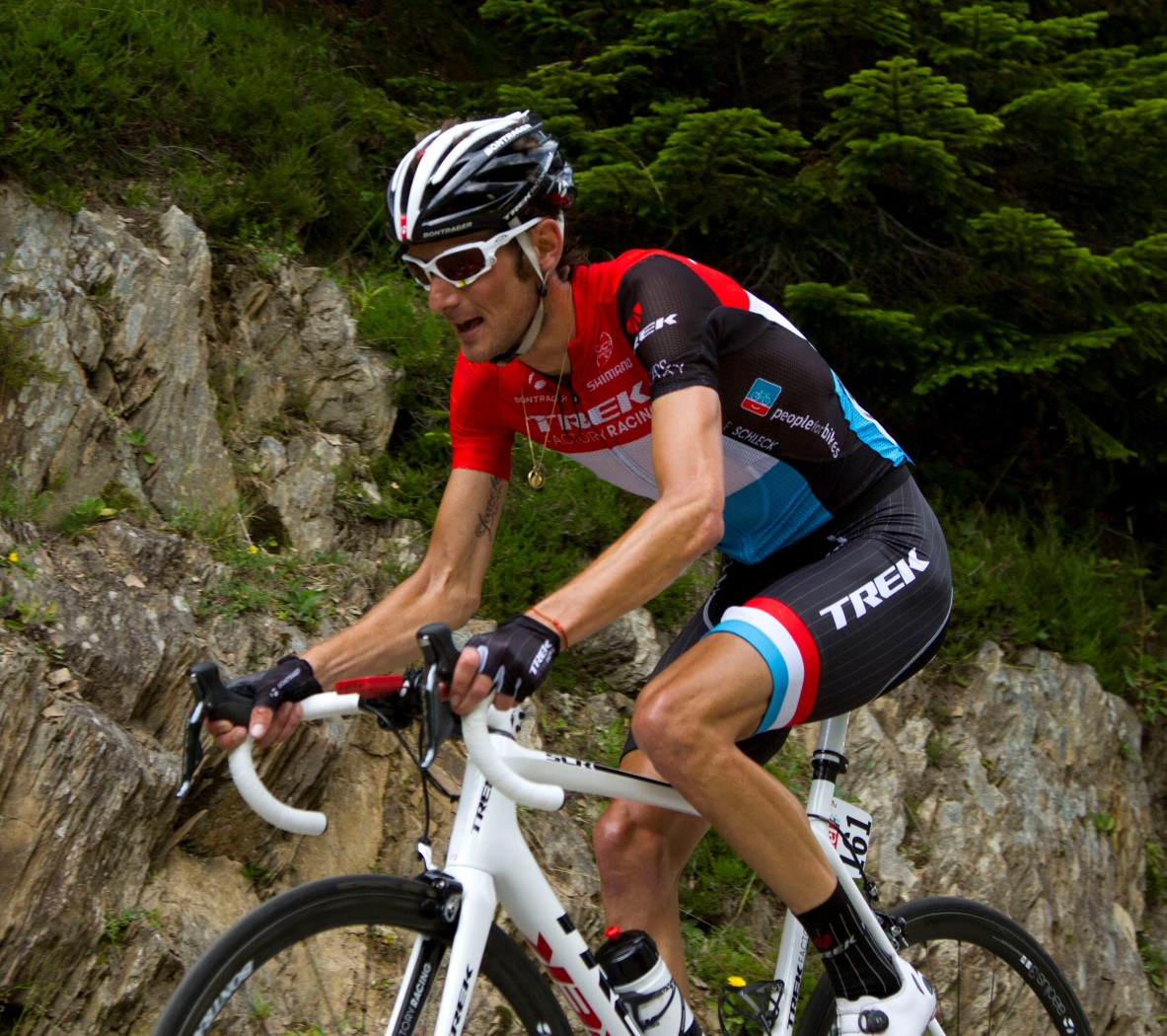 121 frank schleck